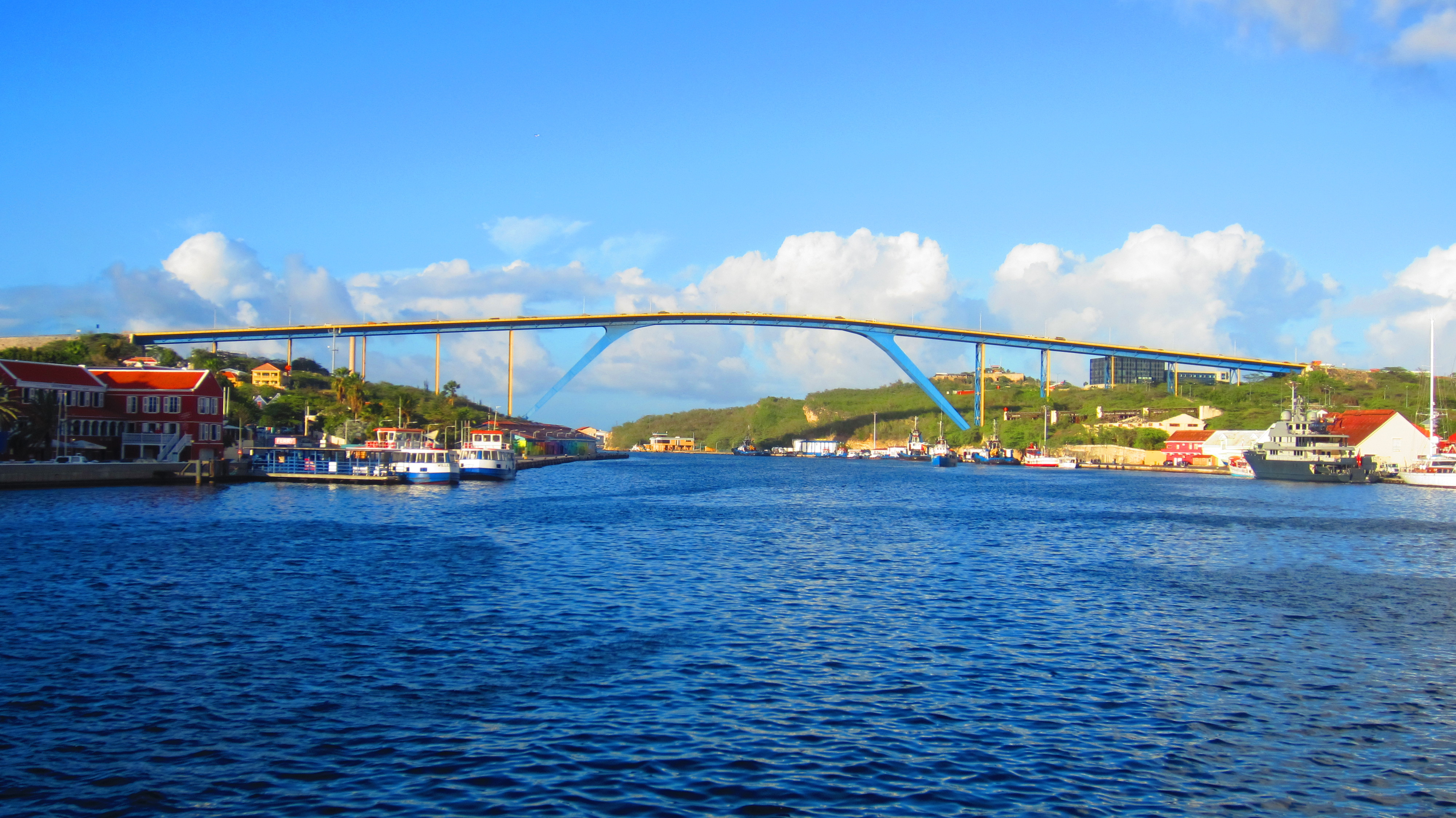 Curaçao